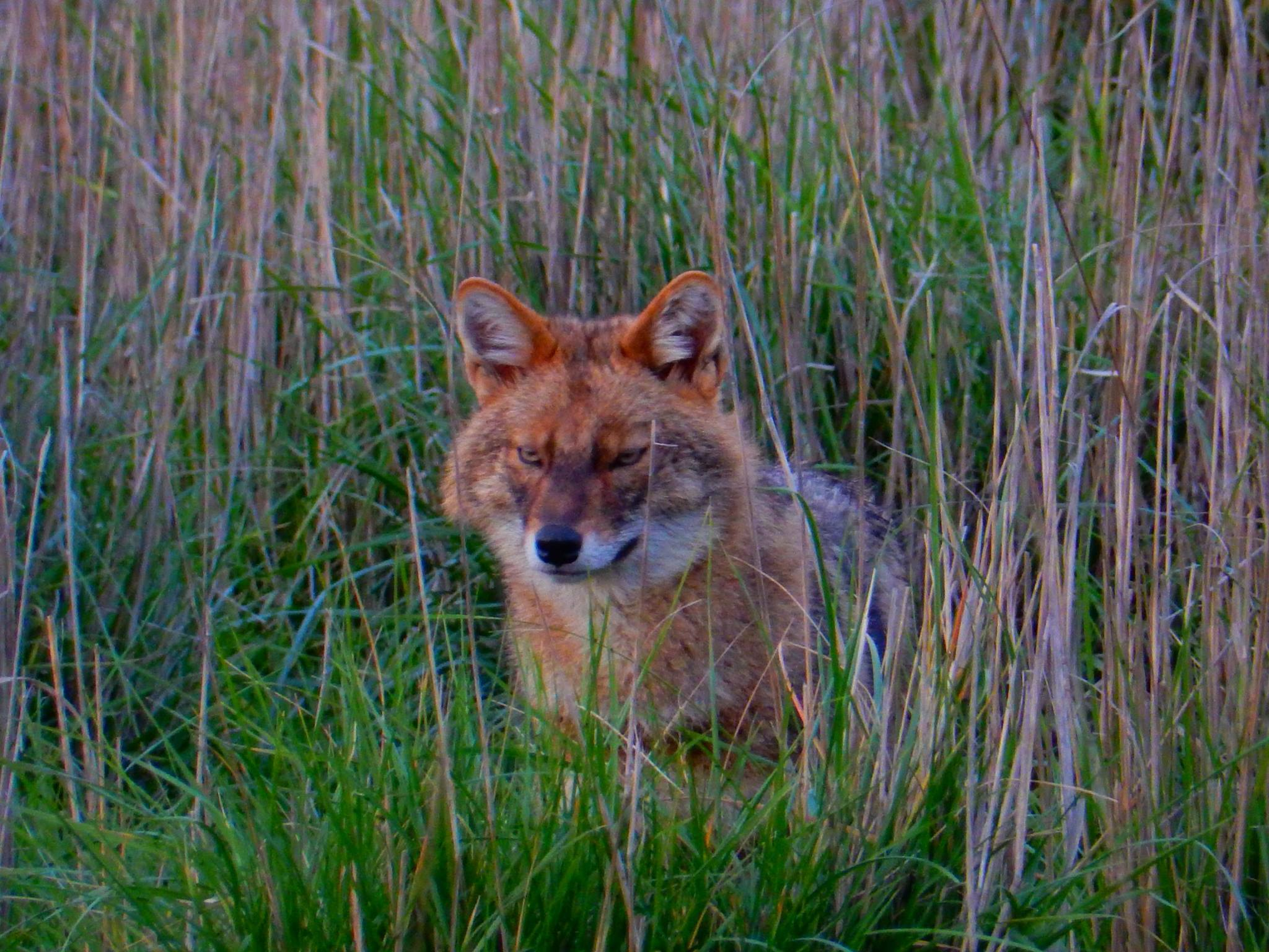 תן באחו נוב